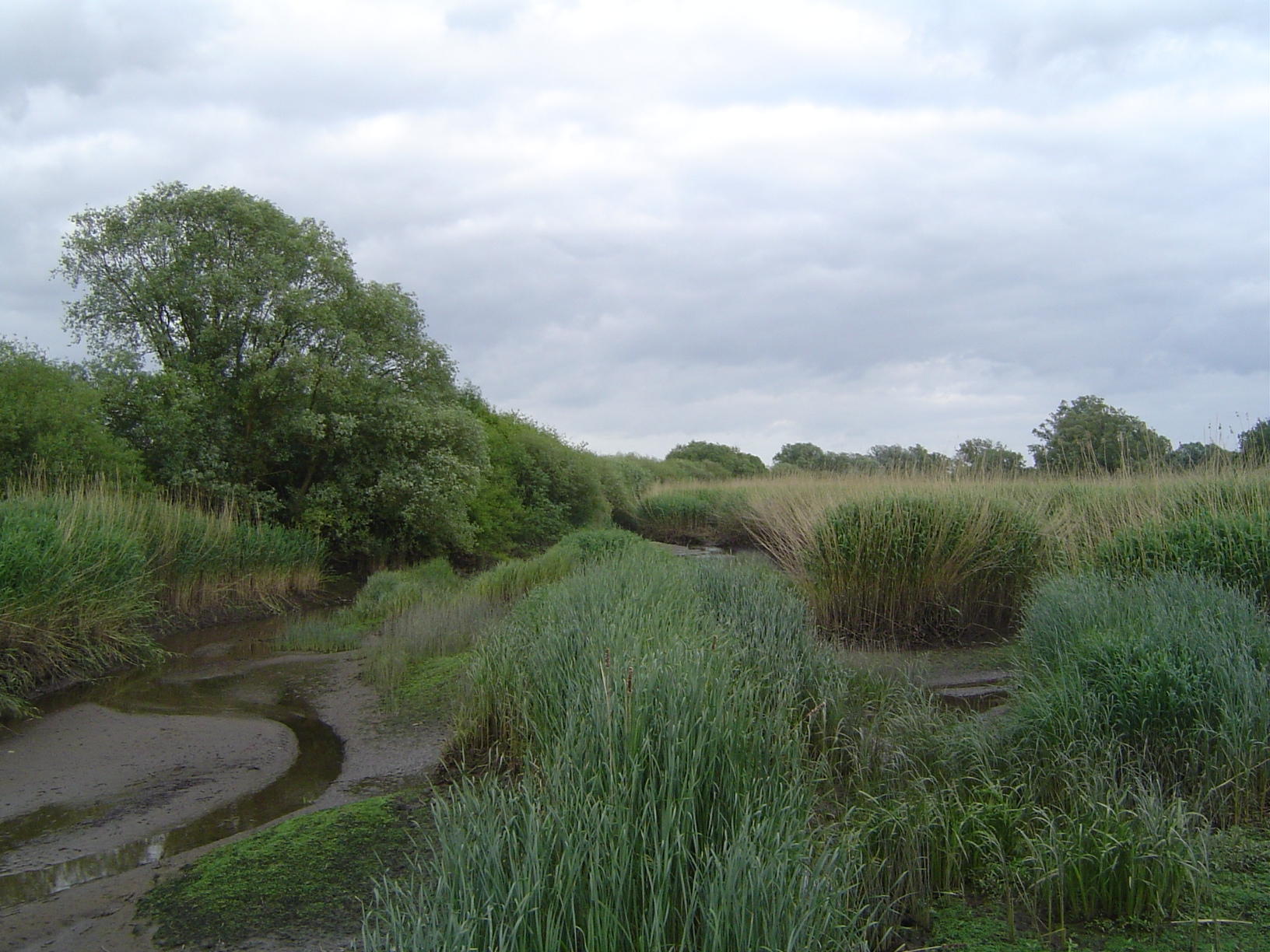 Tide-Süßwasserwatt Heuckenlock/Süderelbe